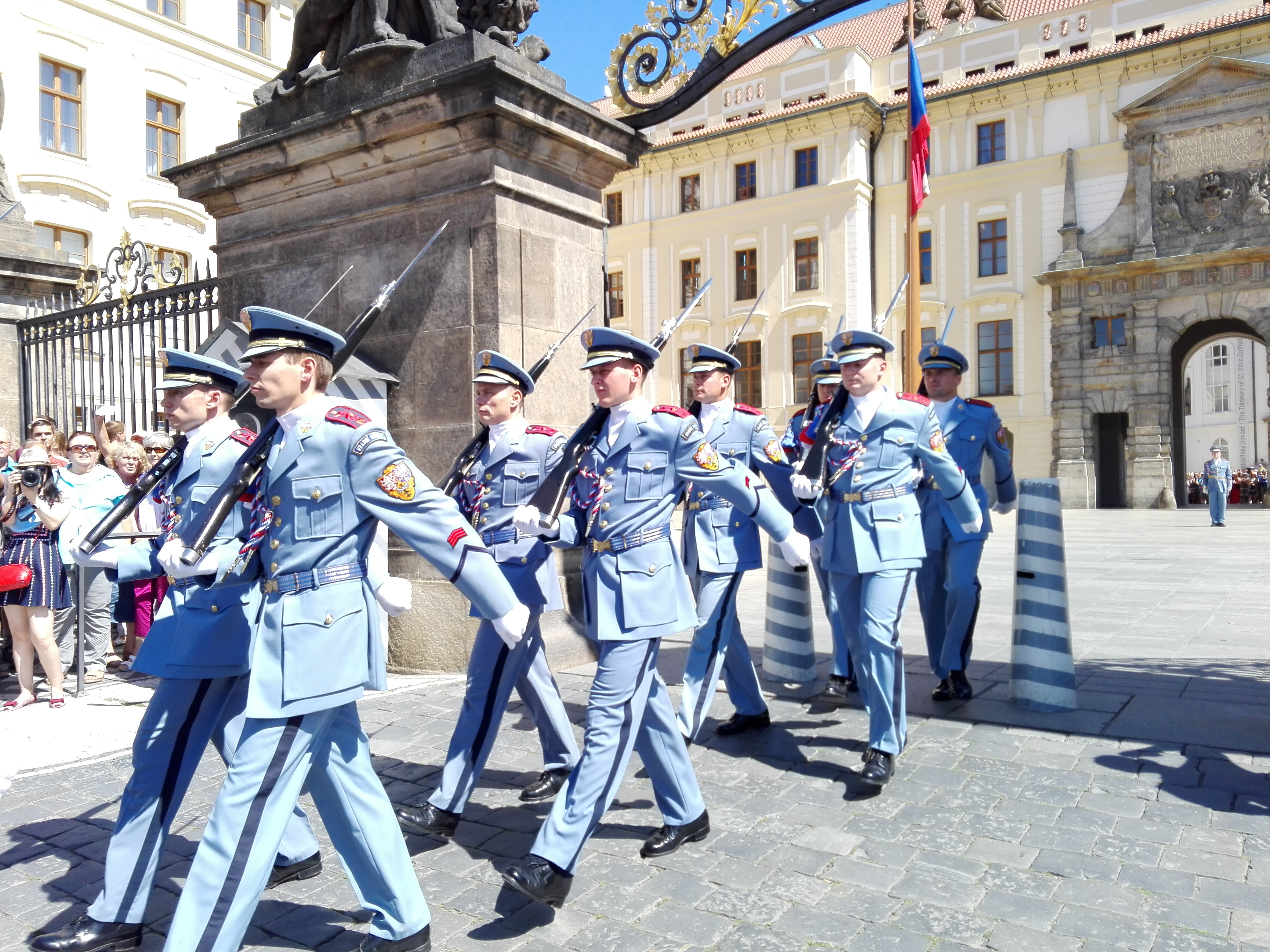 Détachement de la Garde du Château de Prague relevé de son tour de garde, quittant la première cour.